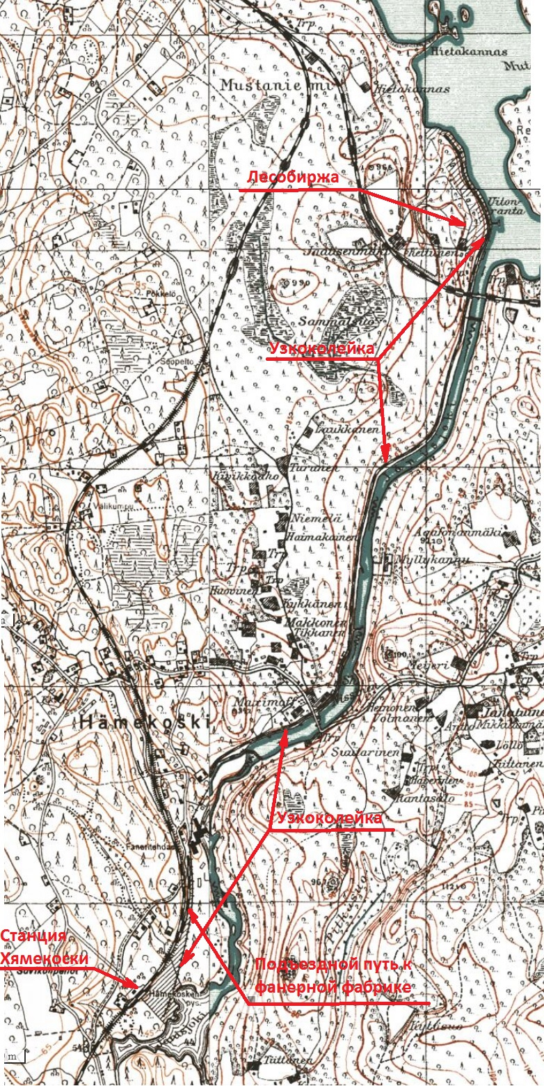 Узкоколейка от Хямекоски к лесобирже.